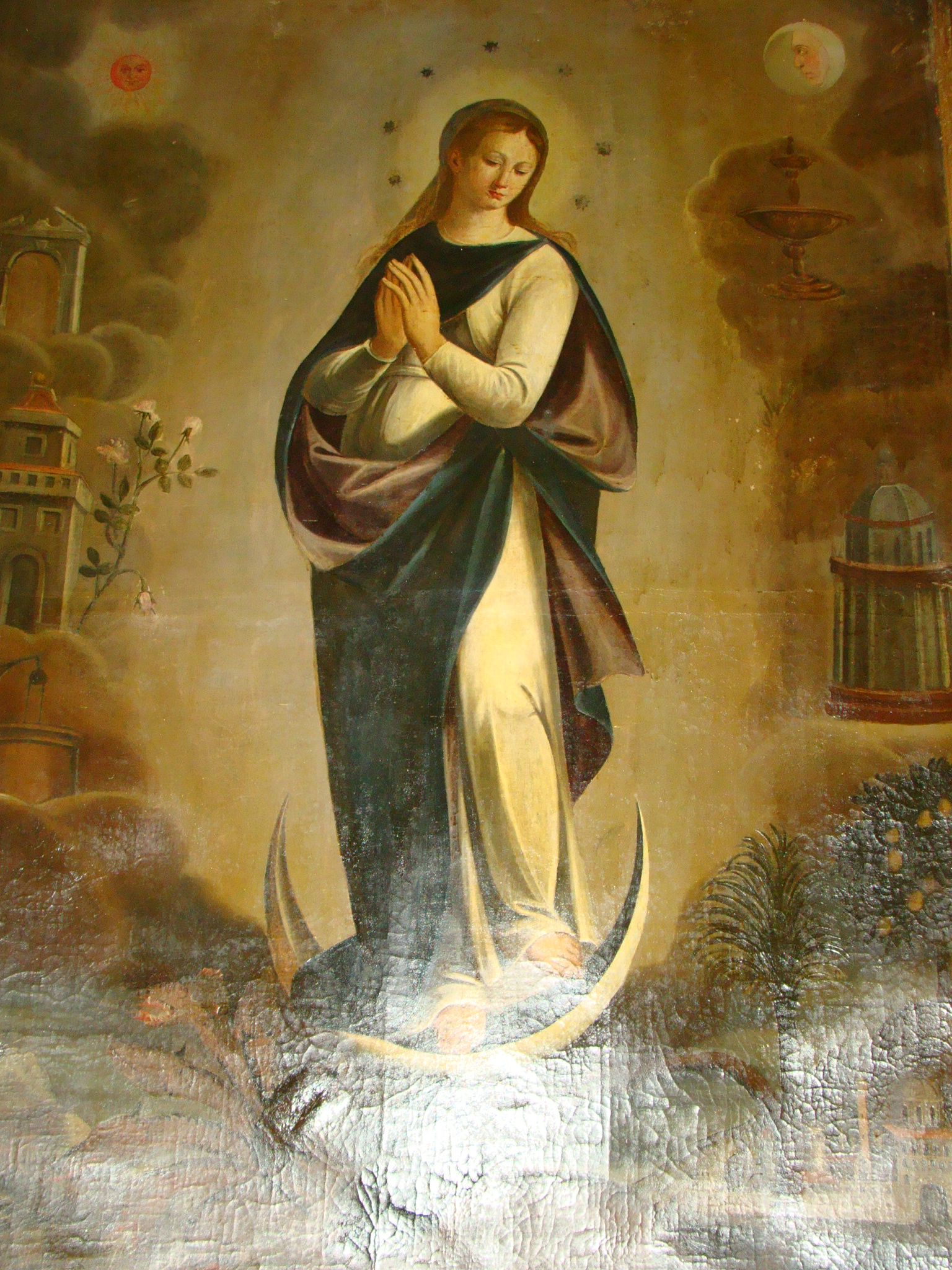 immacolata